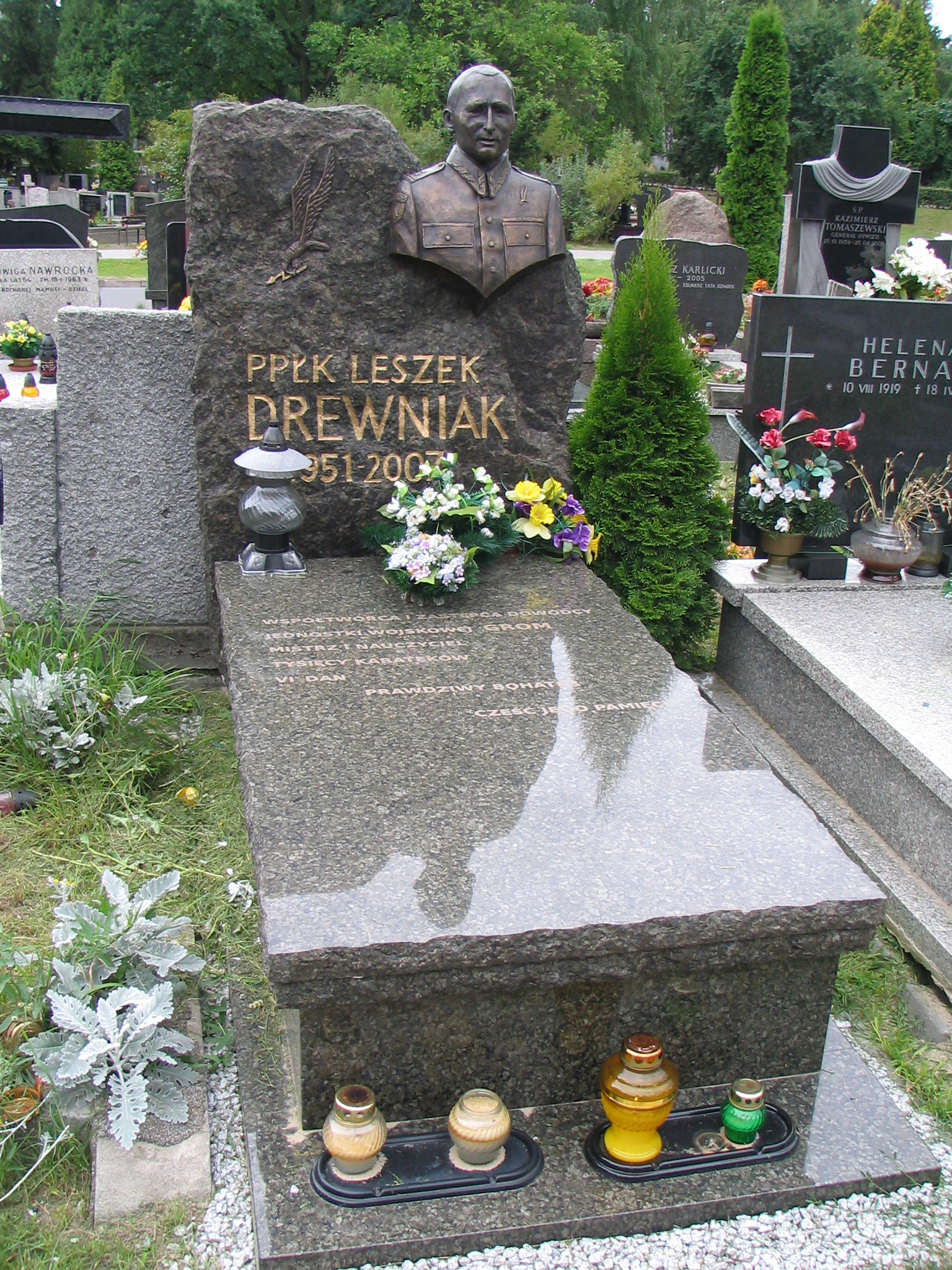 Grób ppłk. Leszka Drewniaka